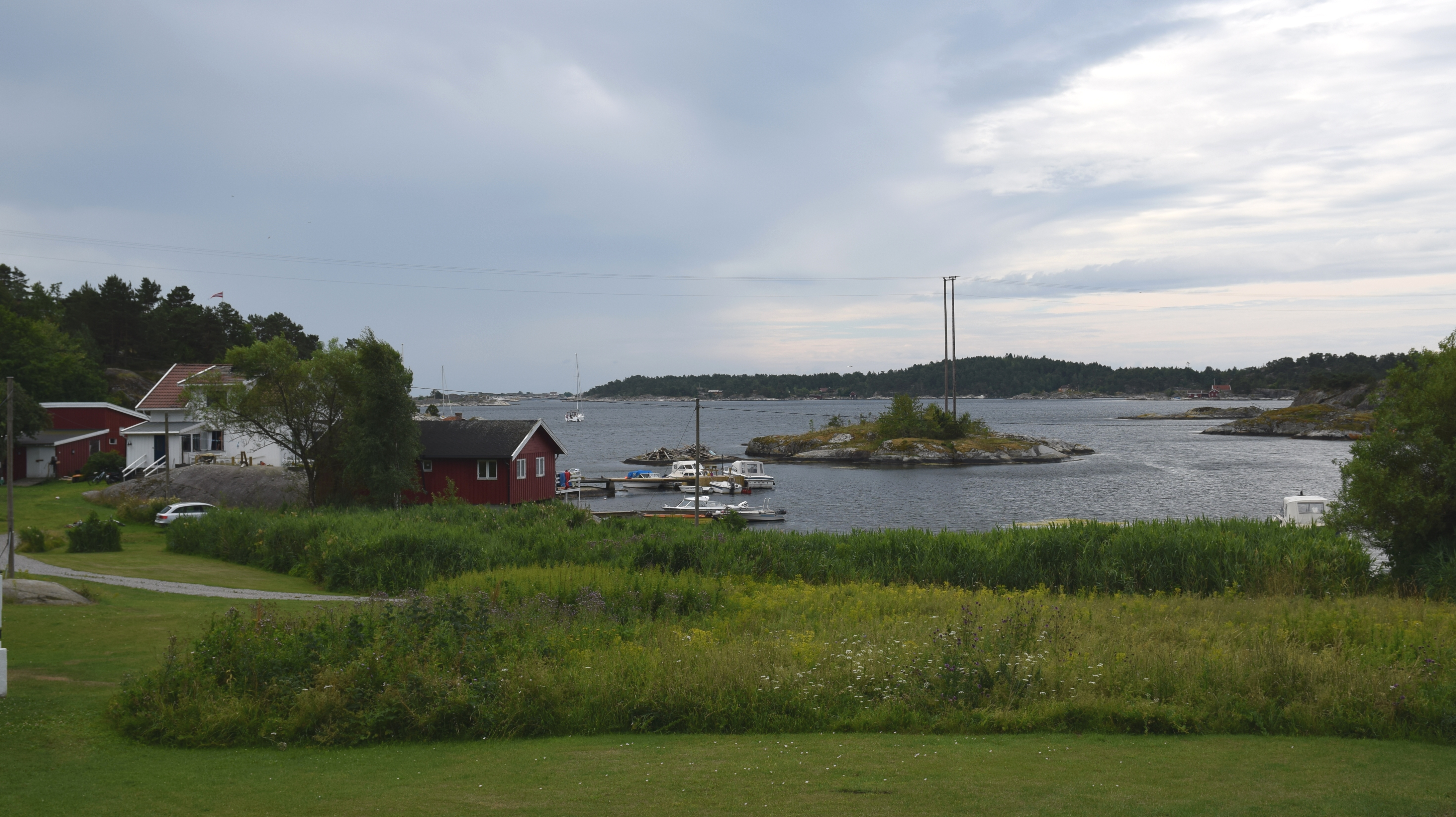 Skåtøy i Kragerø kommune, parti fra Åsvika